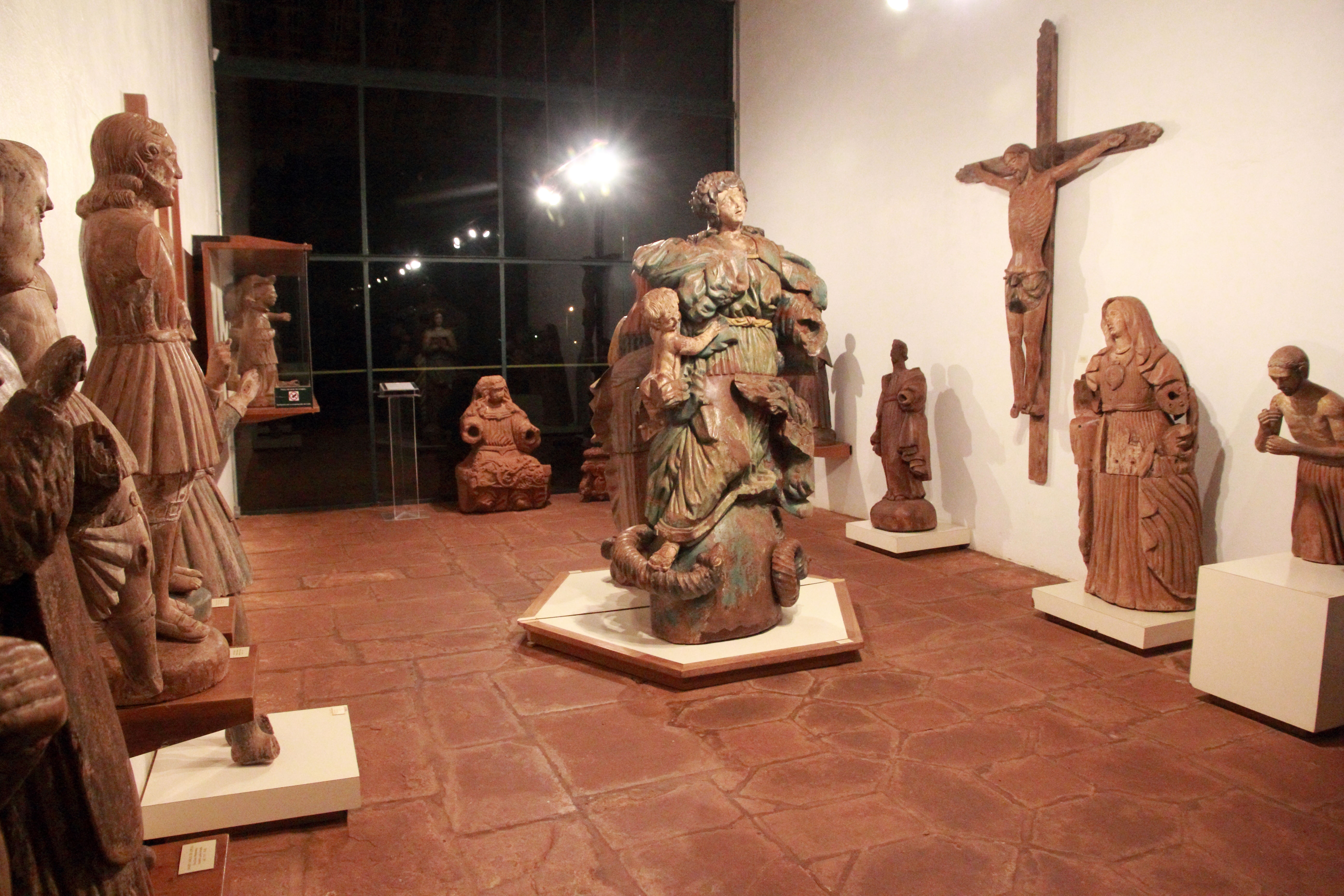 Sítio Arqueológico de São Miguel Arcanjo em São Miguel das Missões, RS.